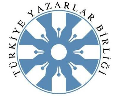 Türkiye Yazarlar Birliği Logosu